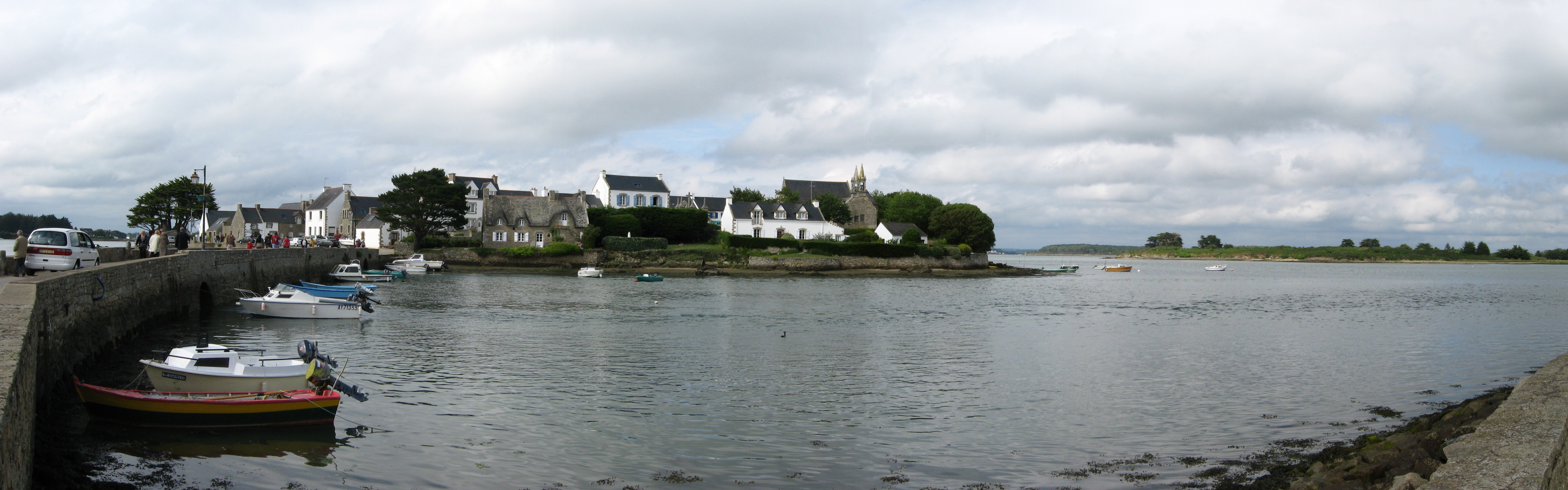 Ile de Saint cado